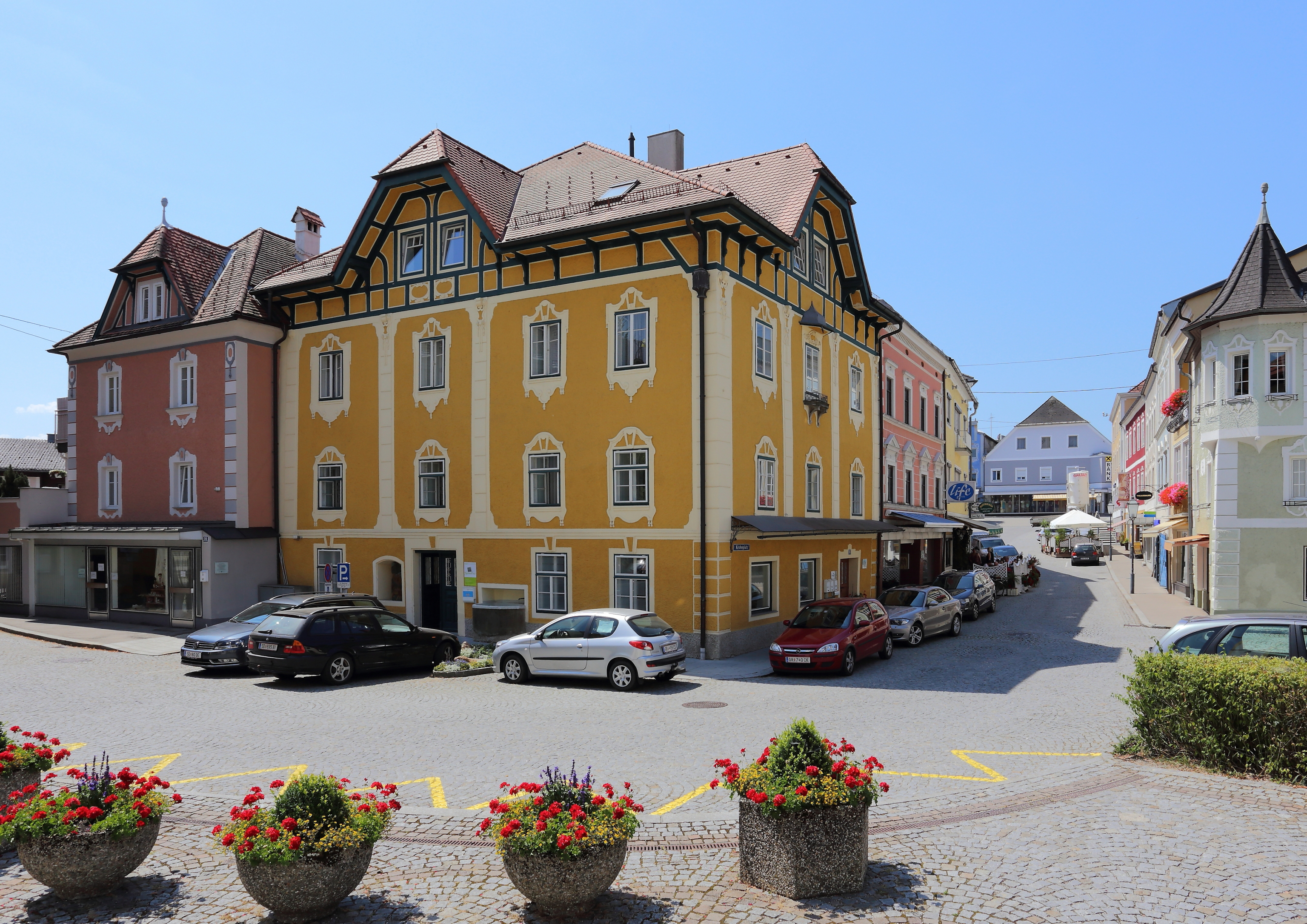 Das Fleisch-Paulnhaus in der oberösterreichischen Stadt Peuerbach.